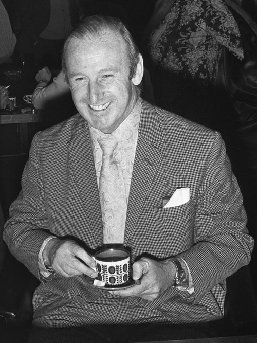 Bertie Mee.